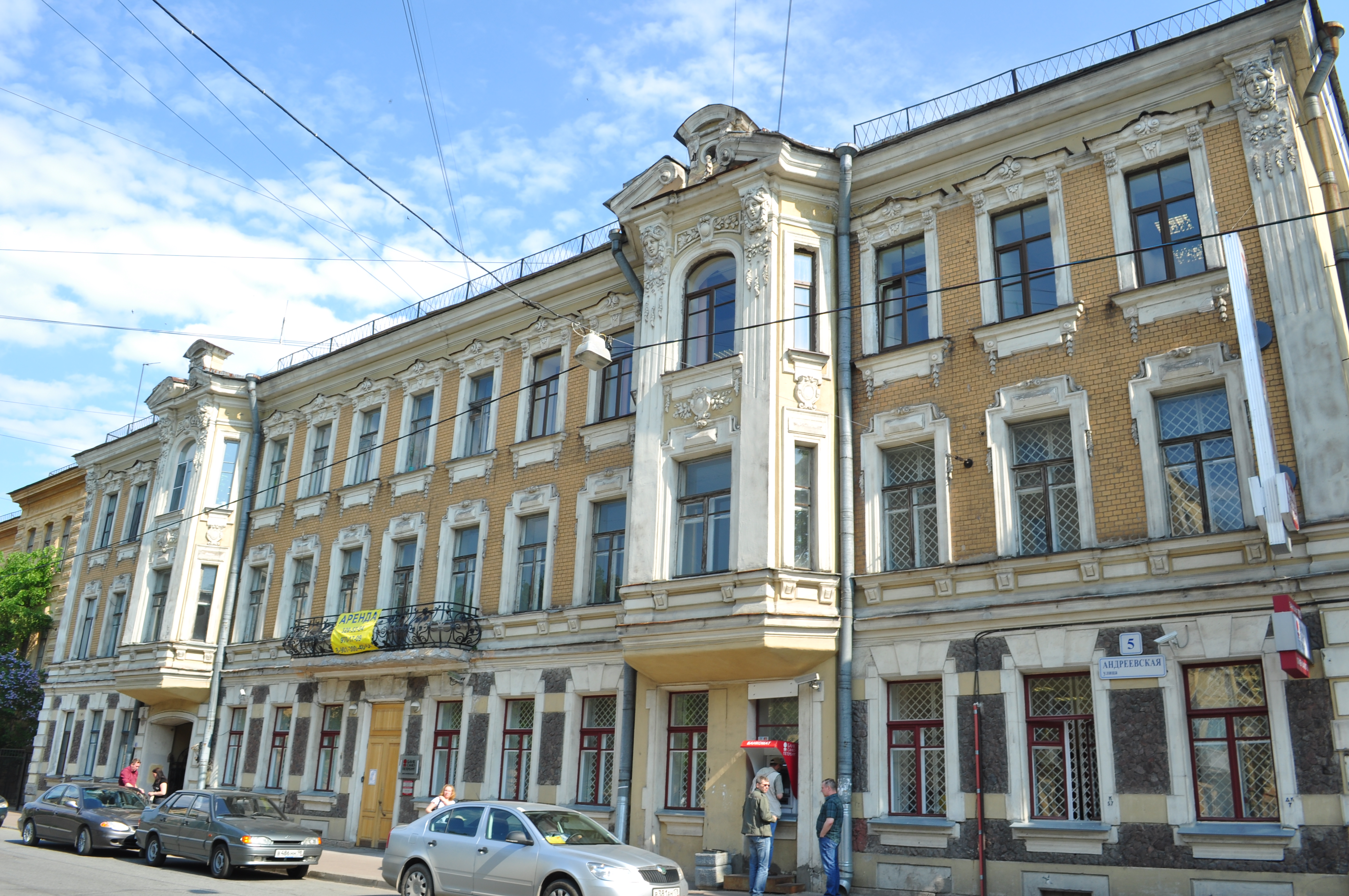 на экскурсии